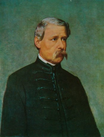 János Arany by Bertalan Székely